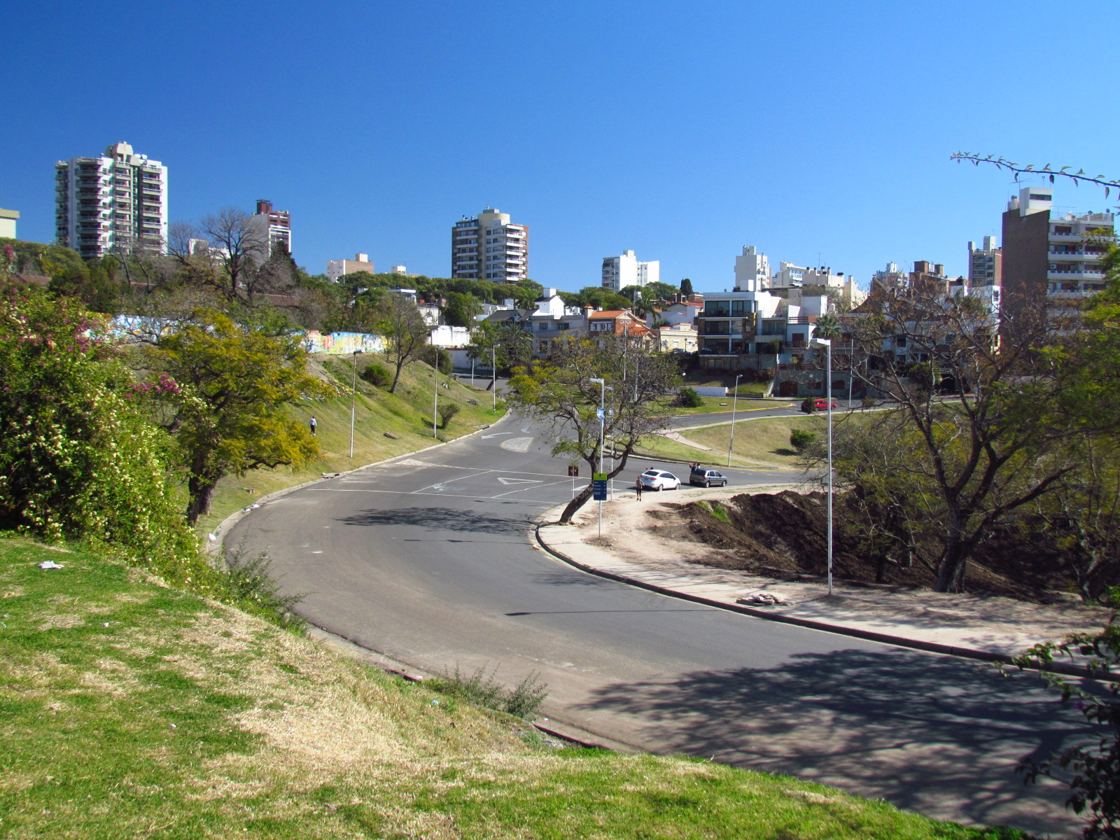 COSTANERA PARANA